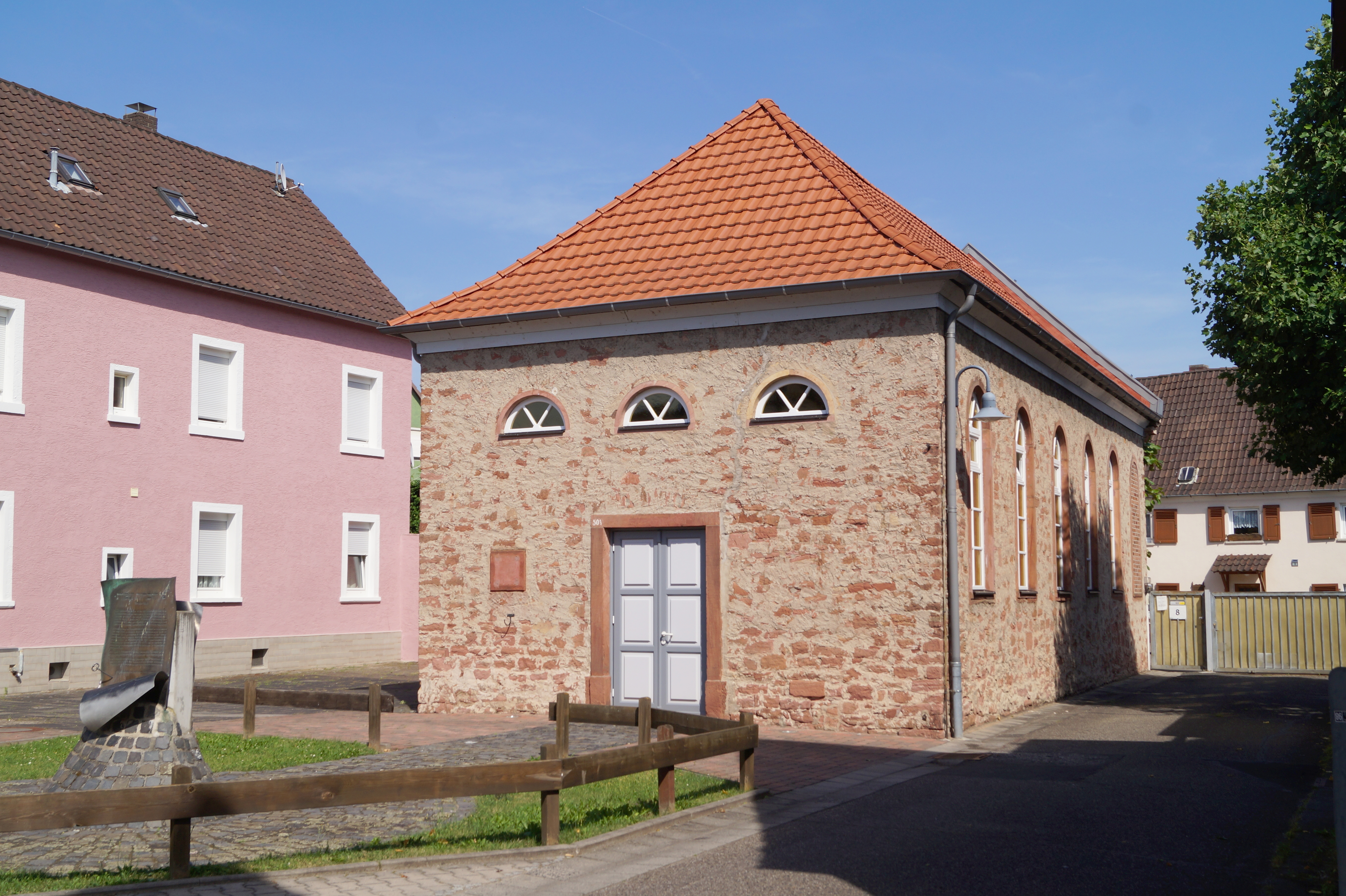 Alte Synagoge in Großkrotzenburg, Ansicht von W 2014.